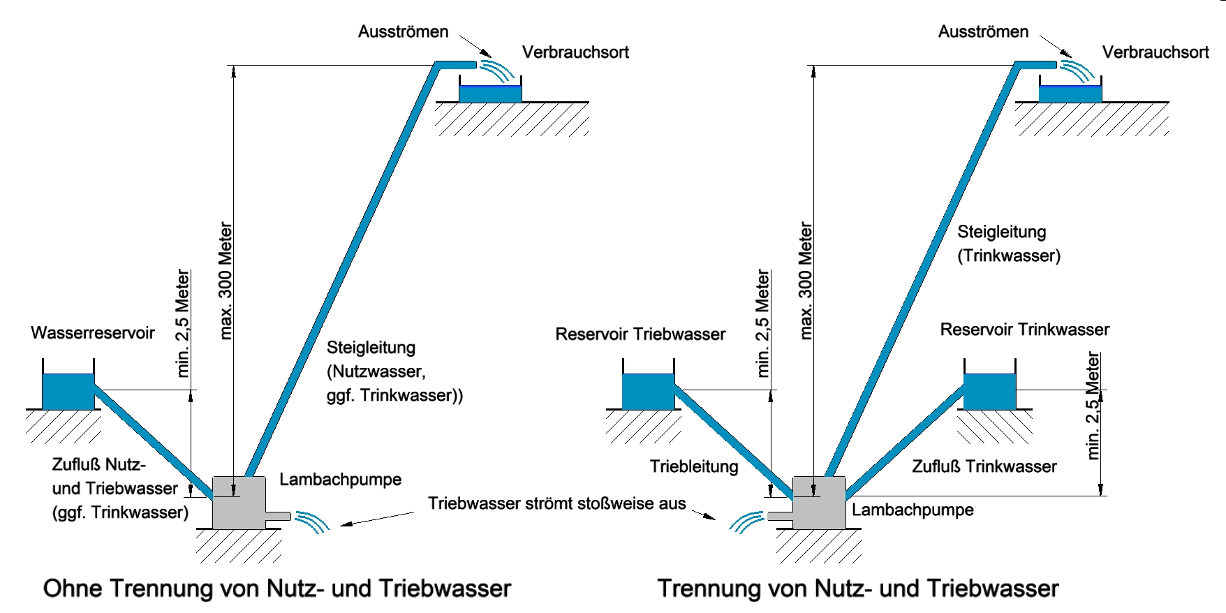 Pumpenverwendung